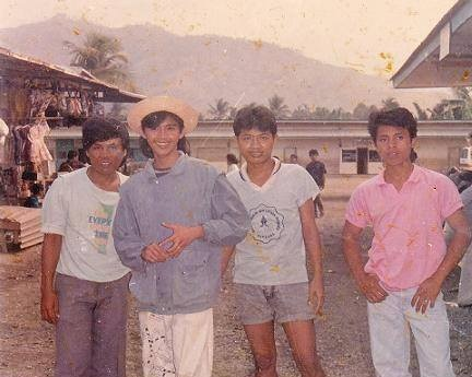 Agus Sutondo di Pasar Komoro Timor Timur